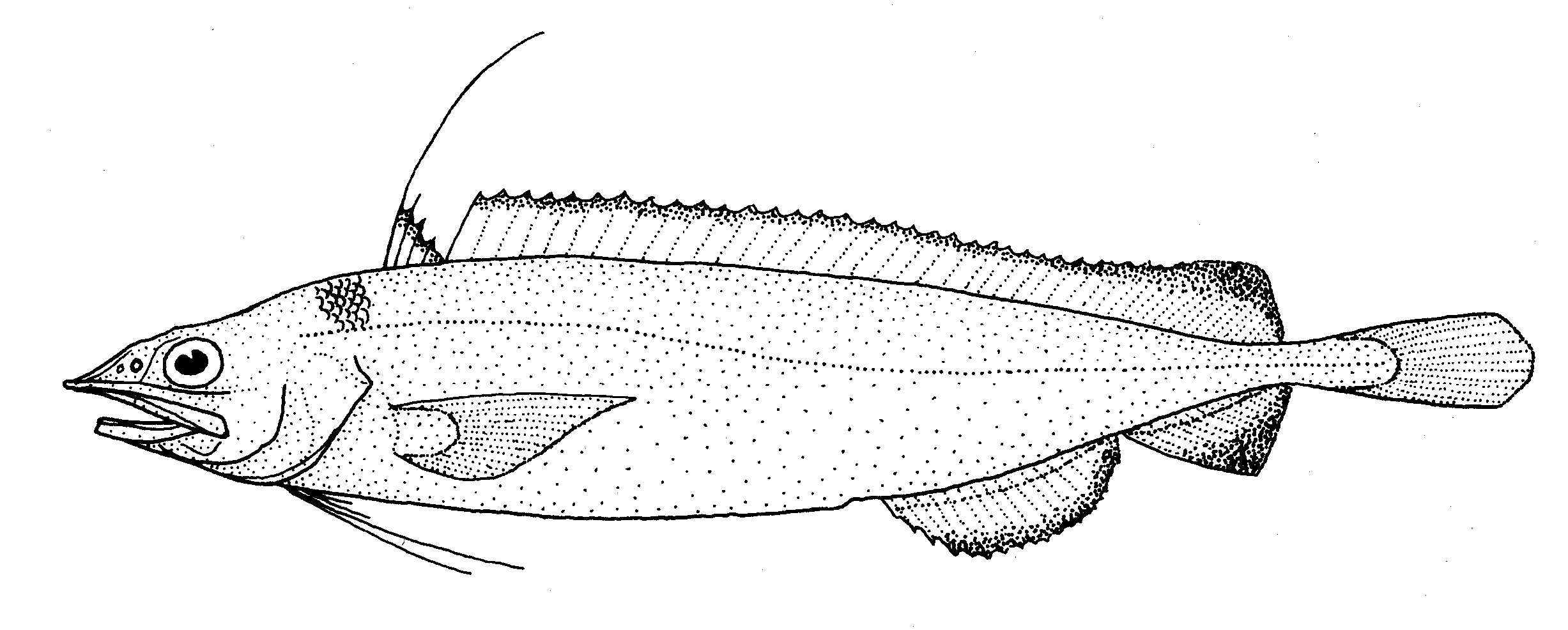 Antimora rostrata (Blue antimora)